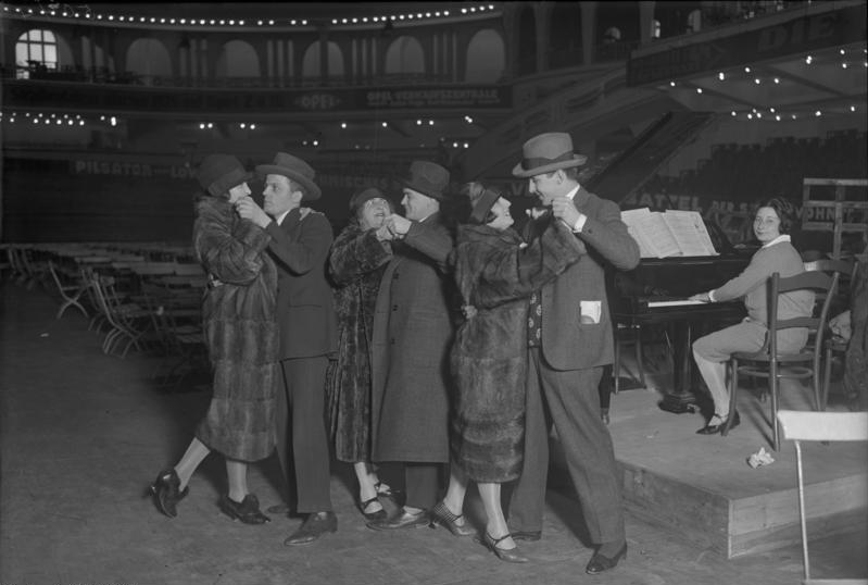 Ein Tänzchen der Sechstagebummler im Innenraum in der vierten Morgenstunde. Eine Klavierspielerin sorgt die ganze Nacht hindurch für Tanzmusik.